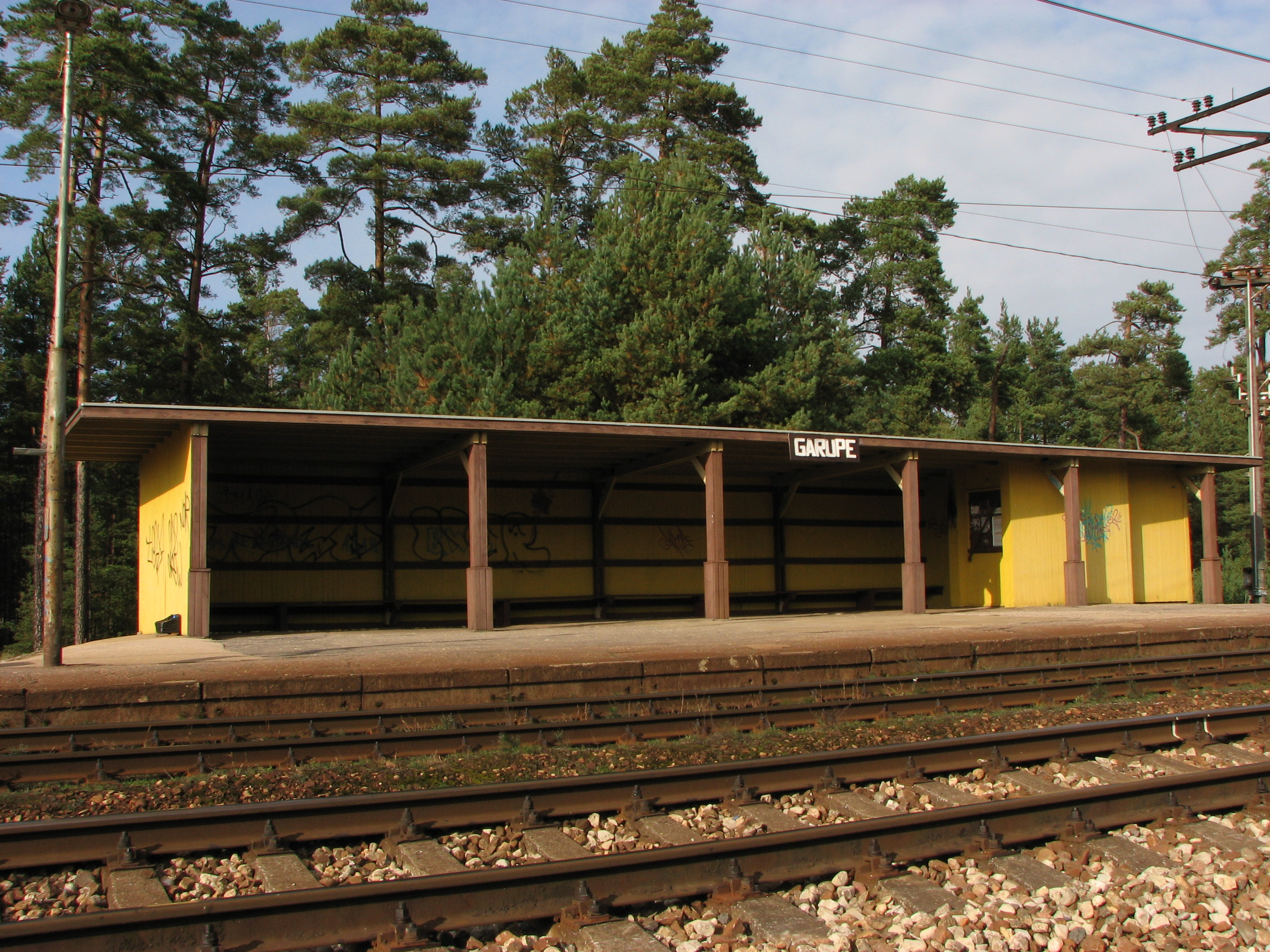 Garupe_station_09.2016